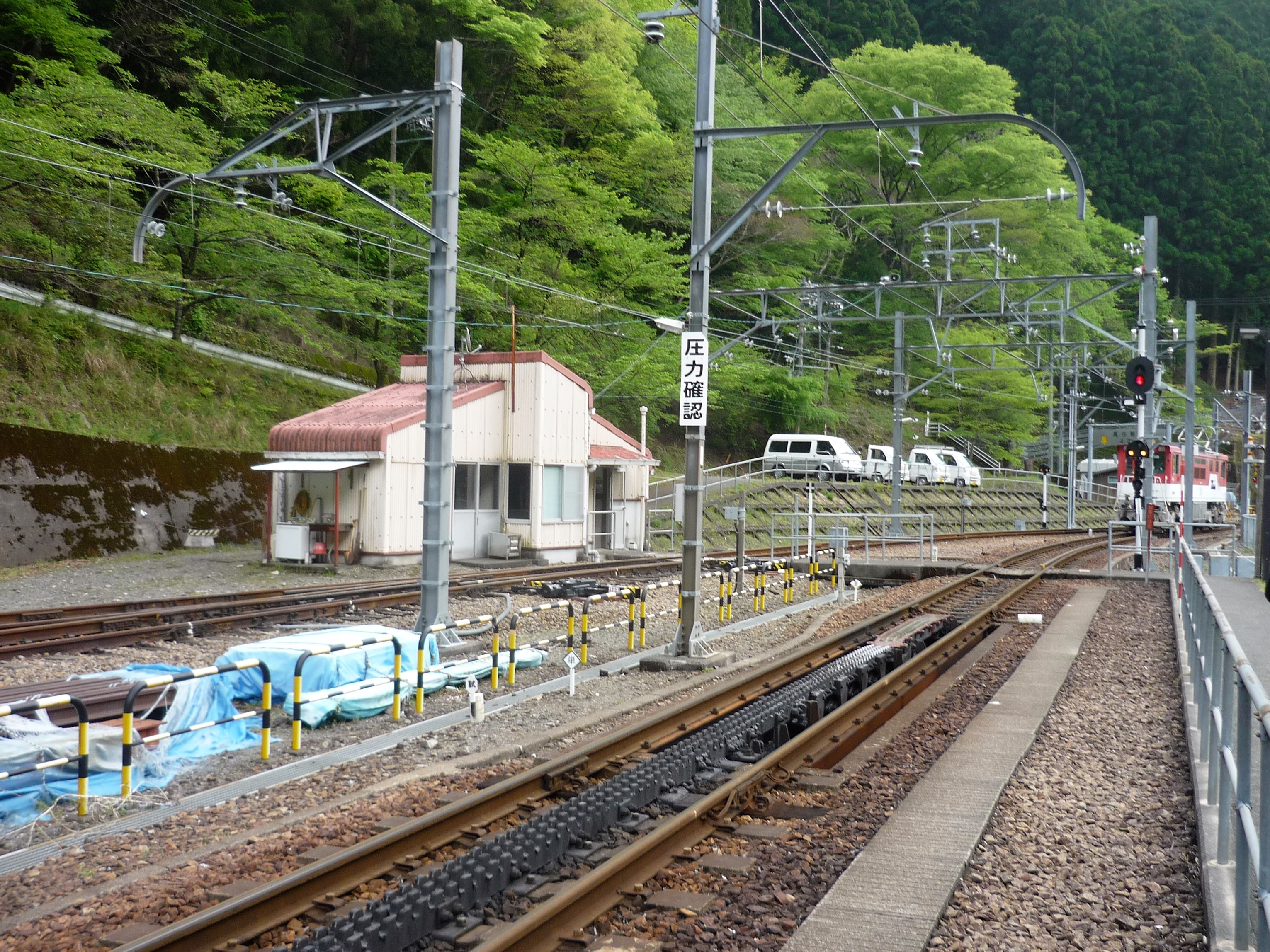 大井川鐵道井川線アプトいちしろ駅のラックレール先端部